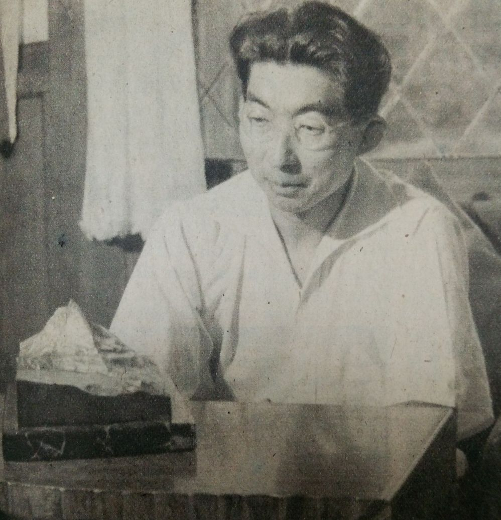 秩父宮雍仁親王